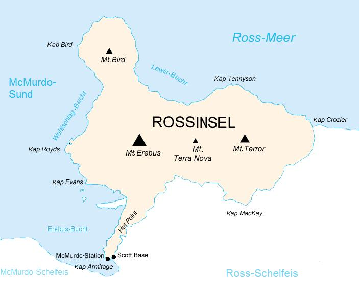 Karte der Ross-Insel, Antarktis